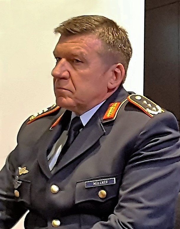 Generalleutnant Karl Müllner bei Landesdelegiertenversammlung des ASP 2016 in Veitshöchheim